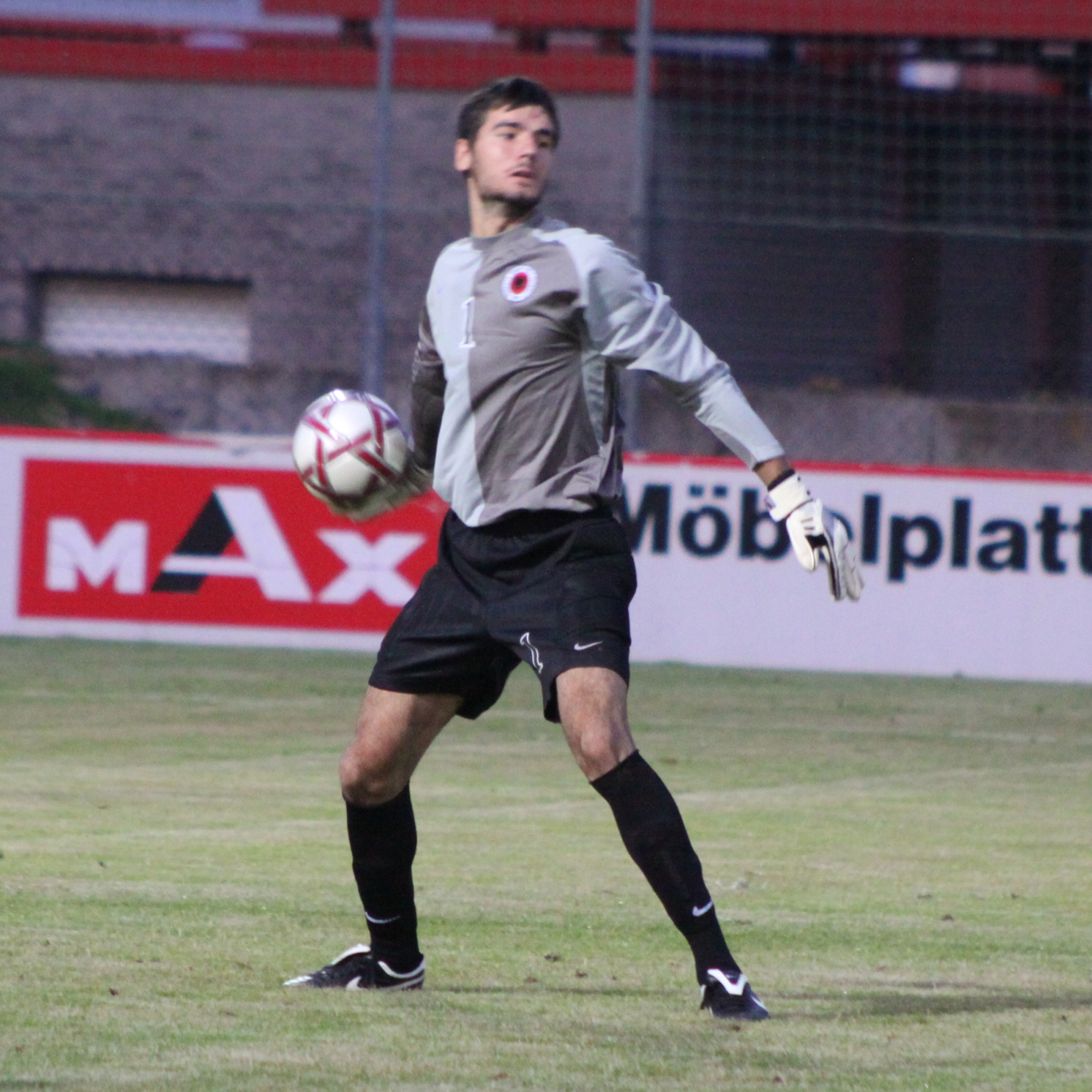 Shpëtim Moçka (KS Flamurtari Vlorë) - Albania national under-21 football team (2)